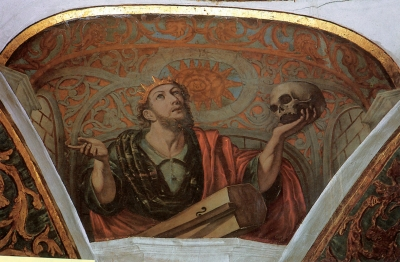 David, por Juan Galván. Fresco de las pechinas del Monasterio de la Concepción de Épila.